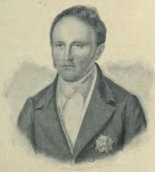 Den norske embetsmannen Frederik Motzfeldt.